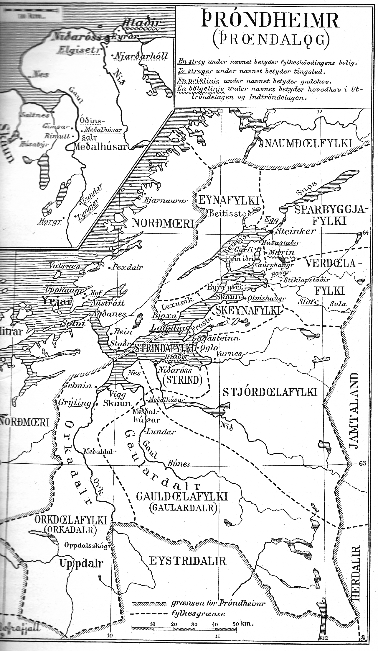 Boka tar for seg år 800-1030. Grensene forandret seg noe, men var stort sett de samme i hele perioden.